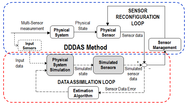 DDDAS